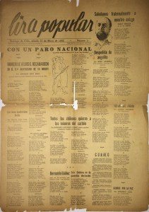 Lira Popular de la década del 50, número 1.